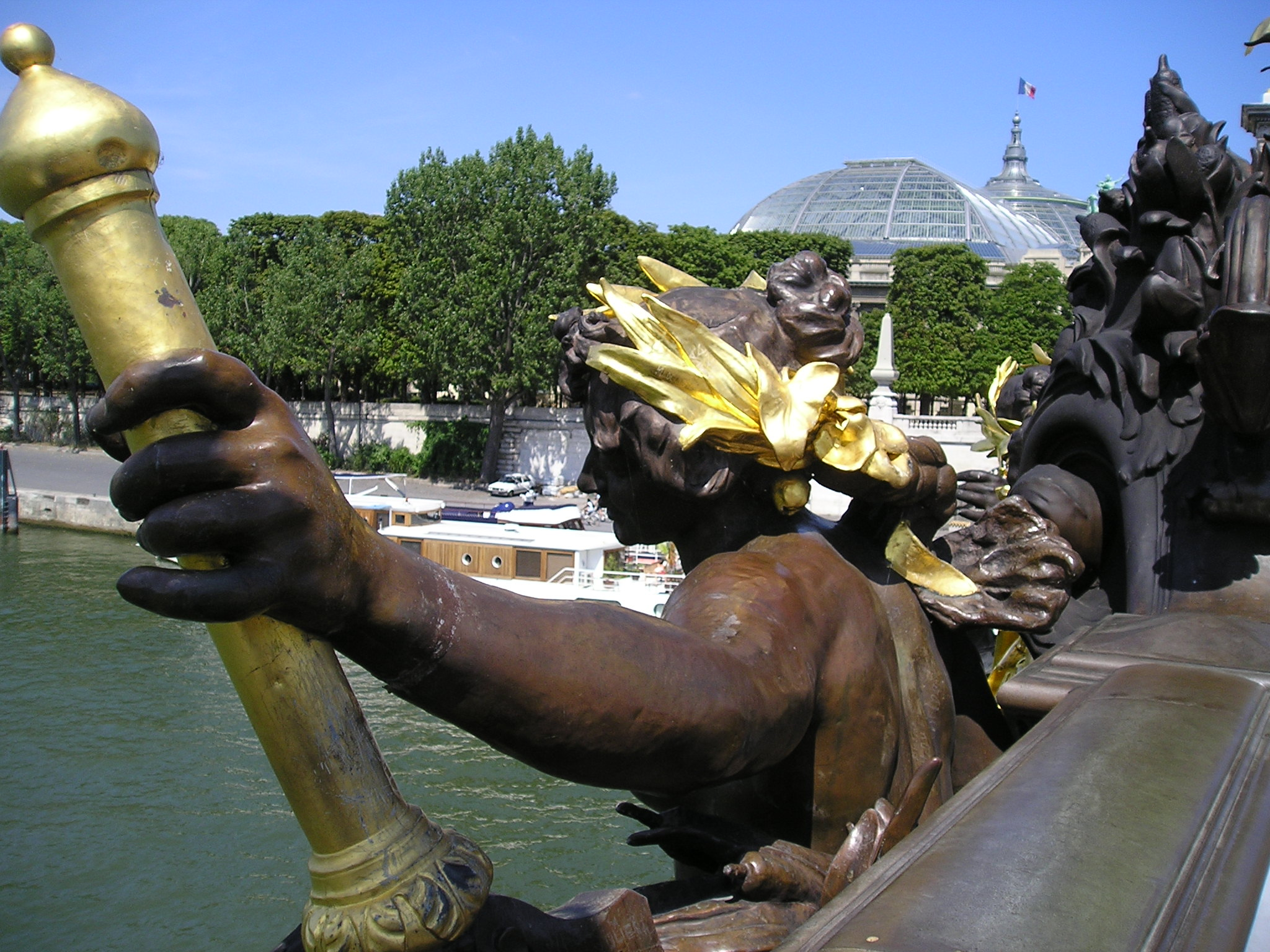 Georges Récipon (Français, 1860-1920): Les nymphes de la Seine avec les armes de Paris, 1900, cuivre martelé, motif central sur le parapet aval du Pont Alexandre-III, Paris, France.